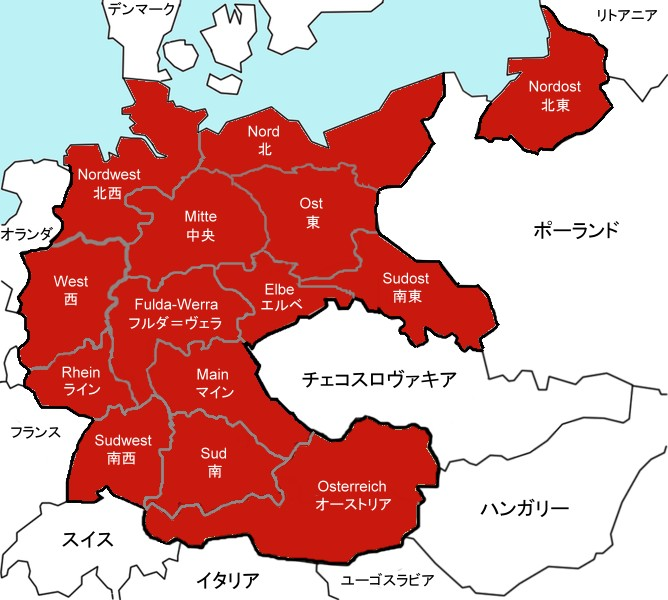 親衛隊（SS）の親衛隊地区（SS-Oberabschnitt）。1938年時のもの。Mark C. Yerger 著 「Allgemeine-SS」（出版Schiffer Pub Ltd）ISBN 0764301454 ISBN 978-0764301452の227ページを参考に作成